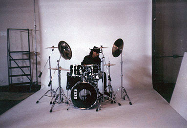 Sesión de fotos para una publicidad de la marca, en la fábrica de baterias Remo en Los Angeles, California.